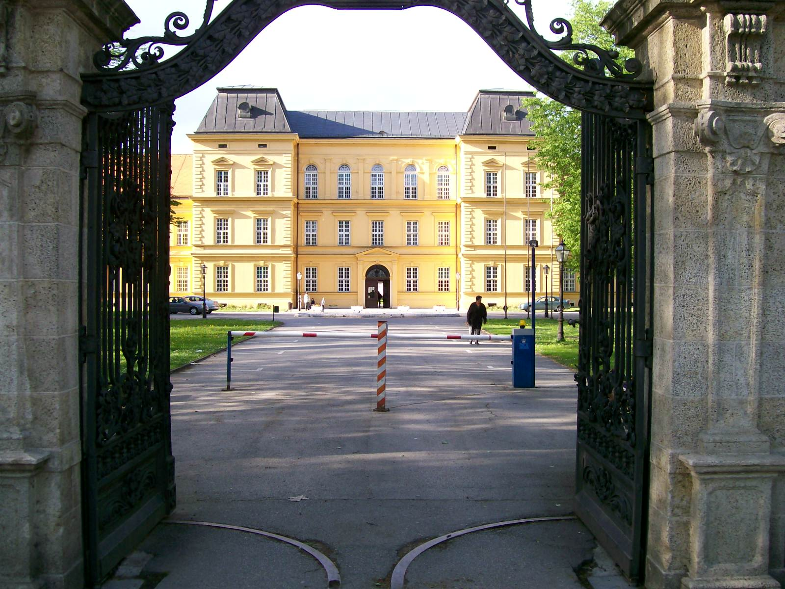 Bolnica Vrapče Zagreb